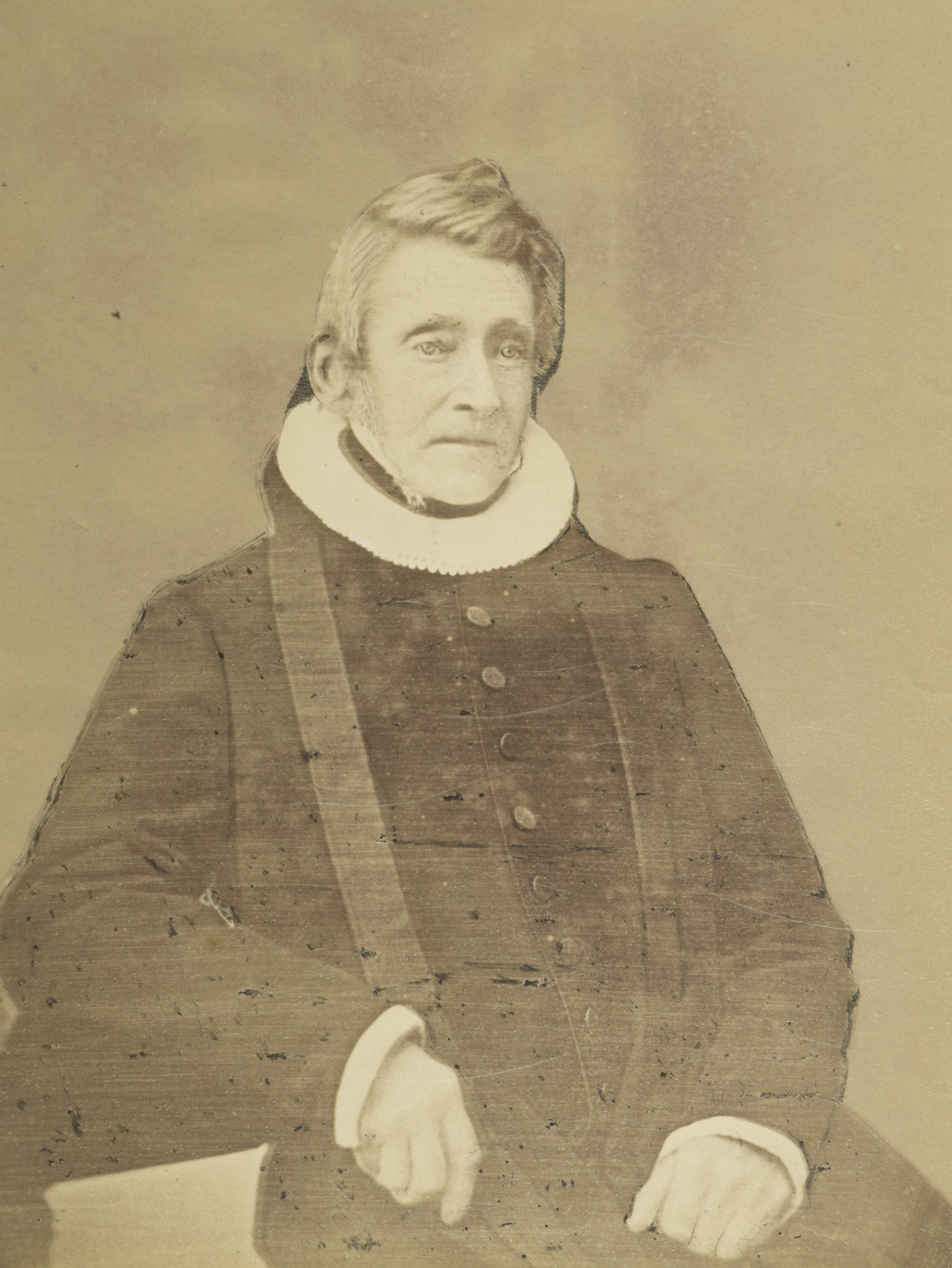 Lorentz Angell (1778–1860), stiftsprost i Trondhjem.